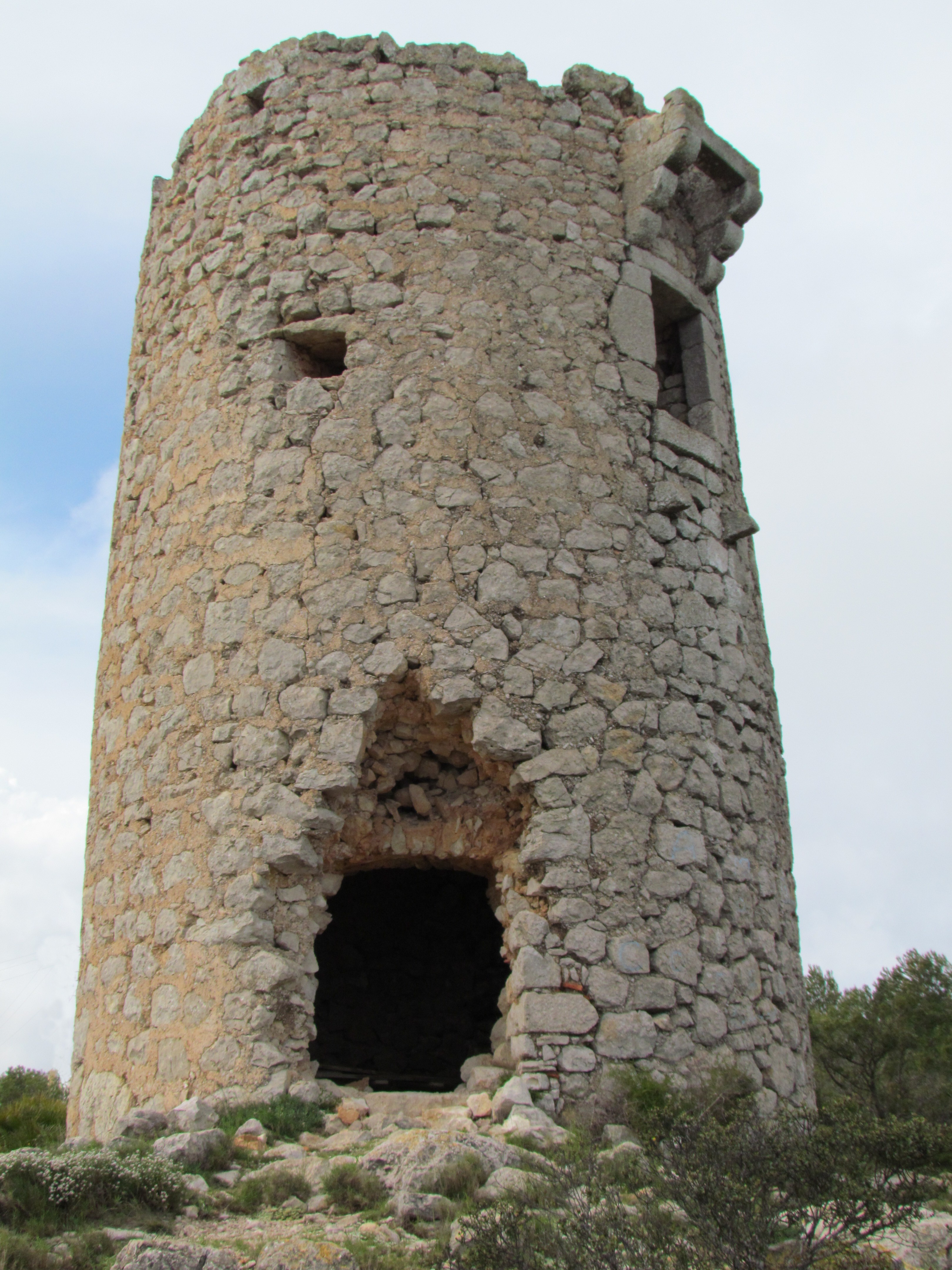 Torre Ebrí vista des del SE. Torre de defensa costera, situada a la serra d'Irta, en el terme d'Alcalà de Xivert (Baix Maestrat)